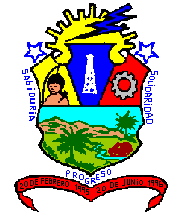 Escudo del municipio Jesús María Semprúm, estado Zulia, Venezuela